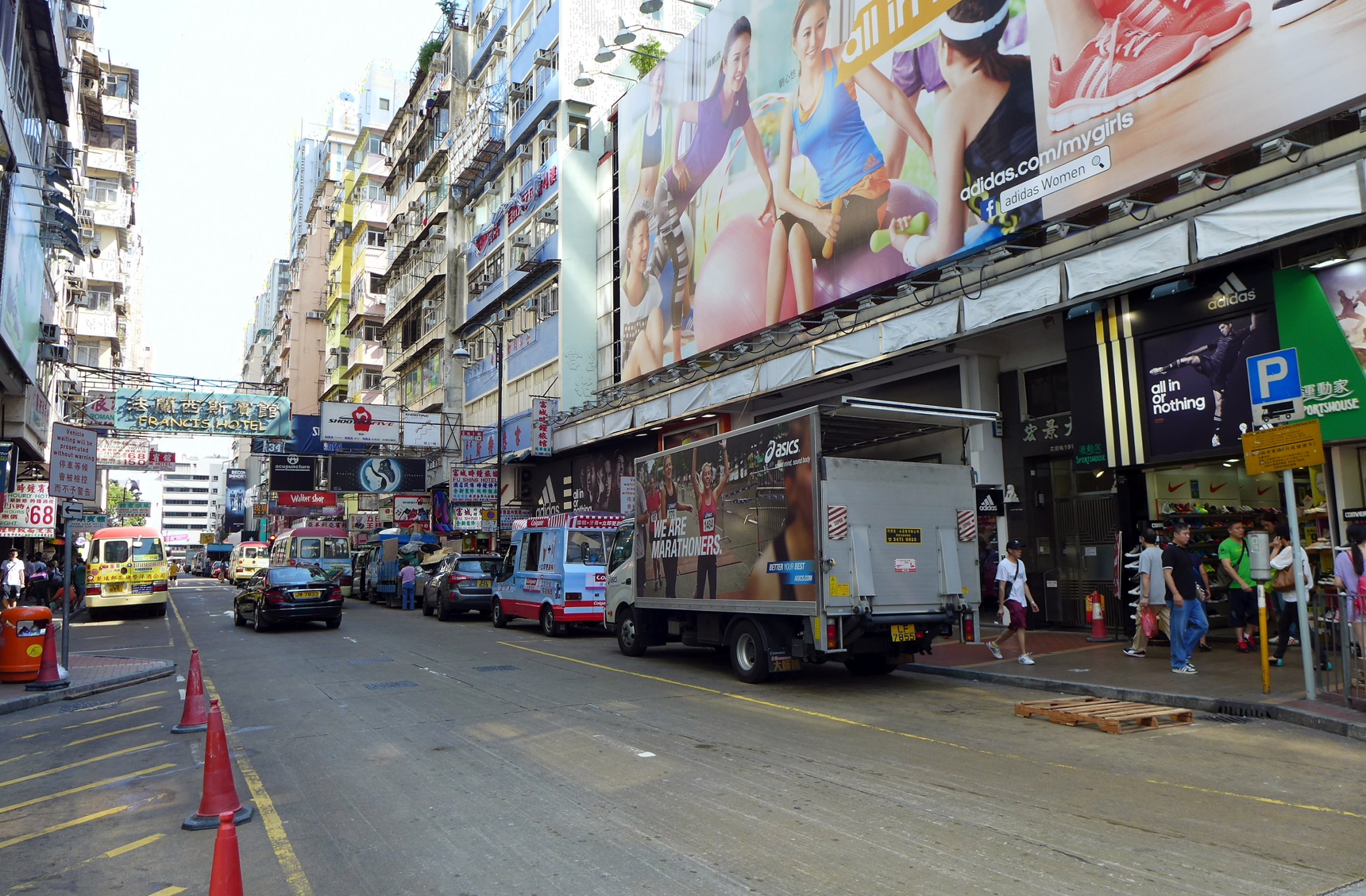 Fa Yuen Street, Mong Kok